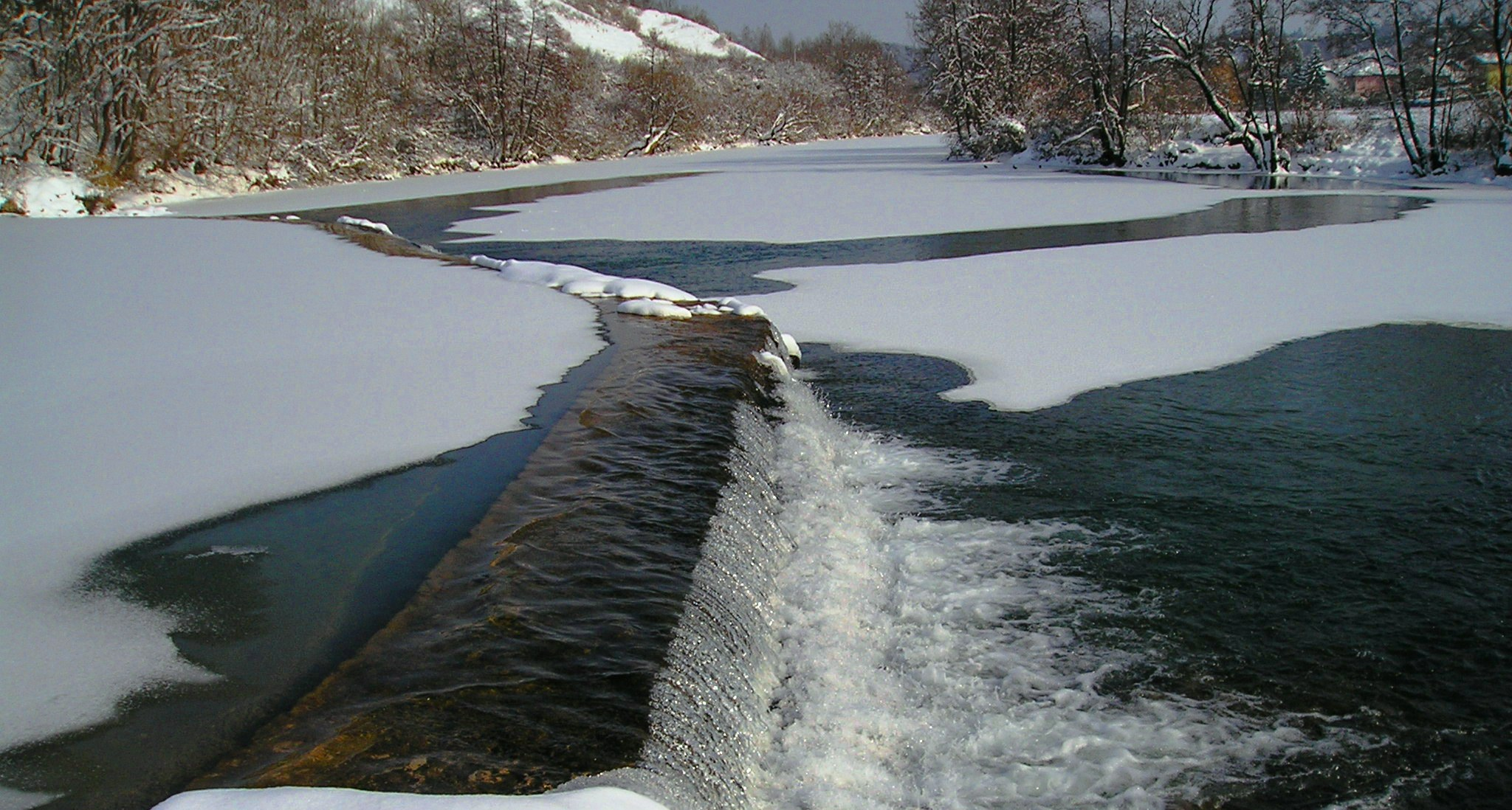 rijeka Dobra